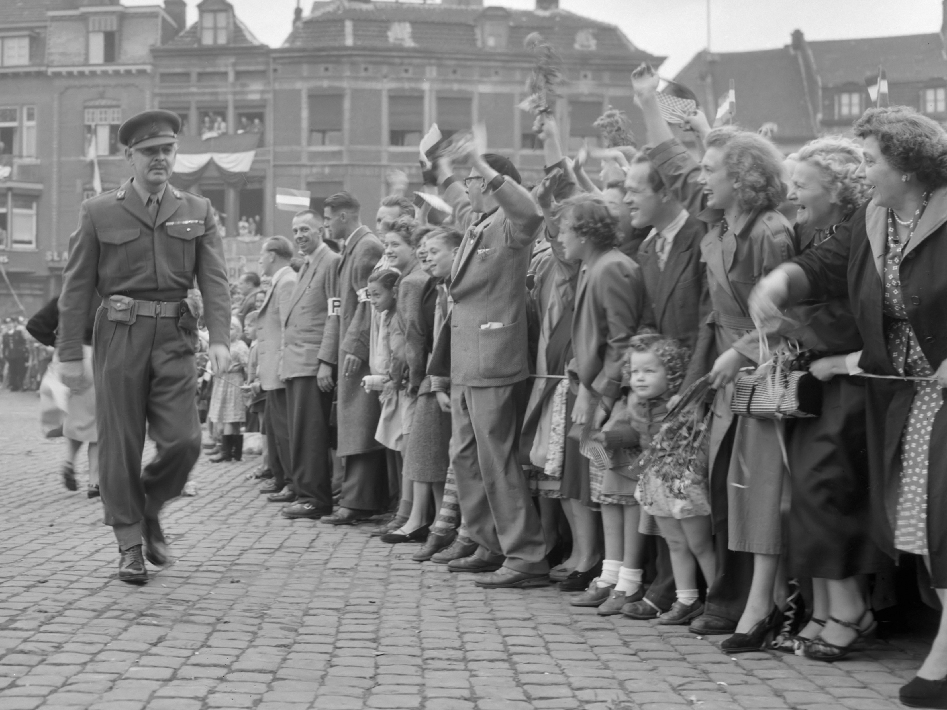 Maastricht. Opnames voor de film "Betrayed" (werktitel: "The true and the brave", met in de hoofdrollen: Clark Gable, Lana Turner en Victor Mature). Clark Gable loopt langs publiek 28 september 1953